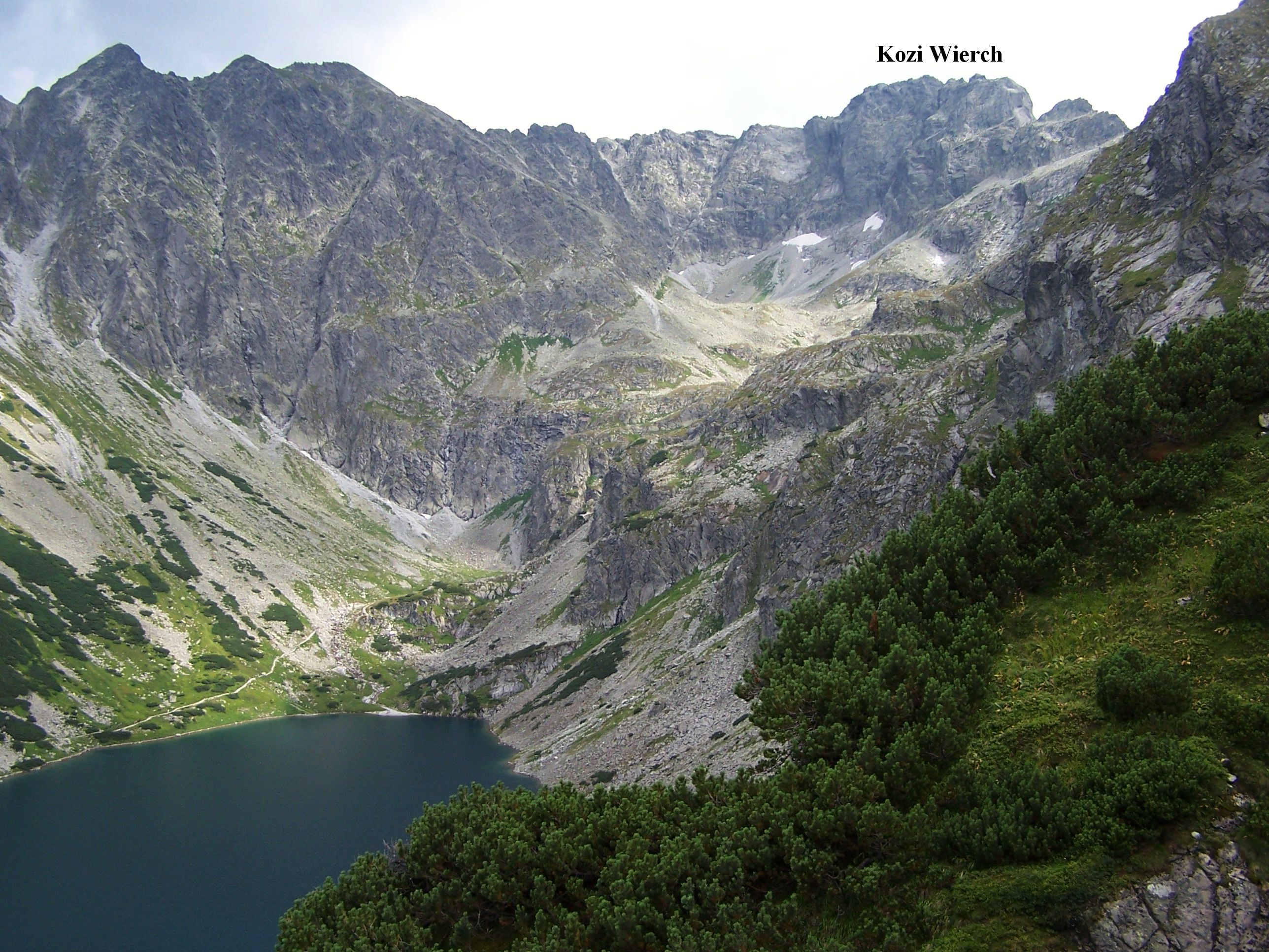 Masyw Granatów i Koziego Wierchu z Małego Kościelca